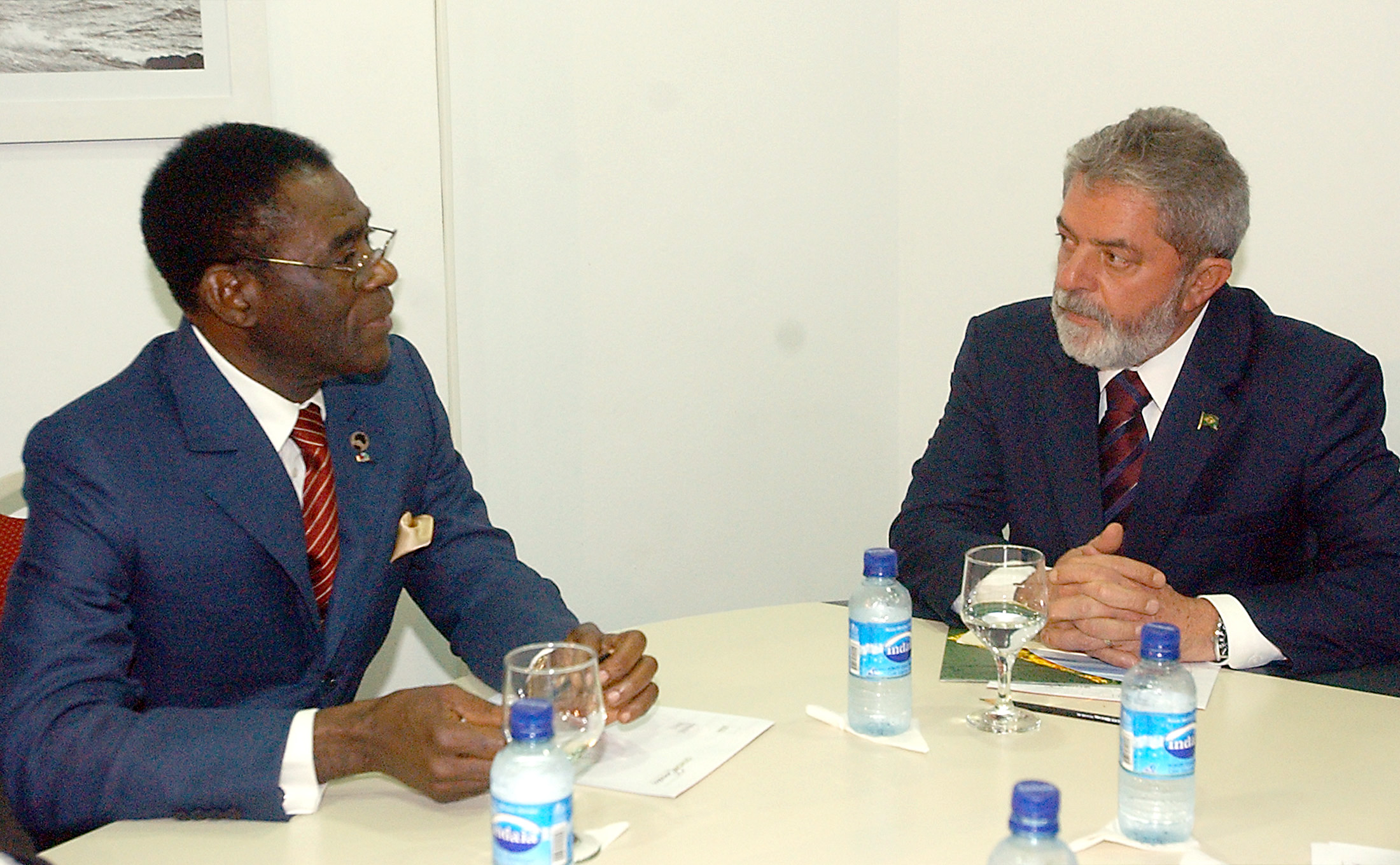 Teodoro Obiang Nguema Mbasogo, President of Equatorial Guinea, with Luiz Inácio Lula da Silva, President of Brasil